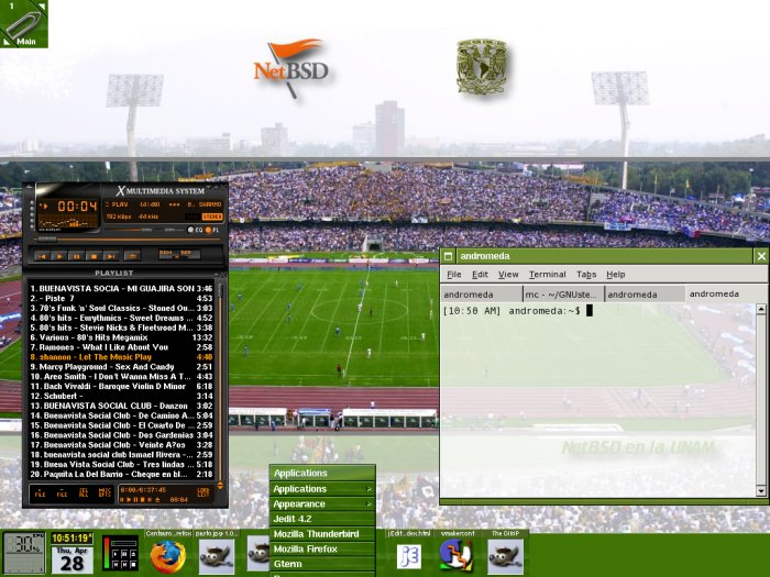 NetBSD WindoMaker